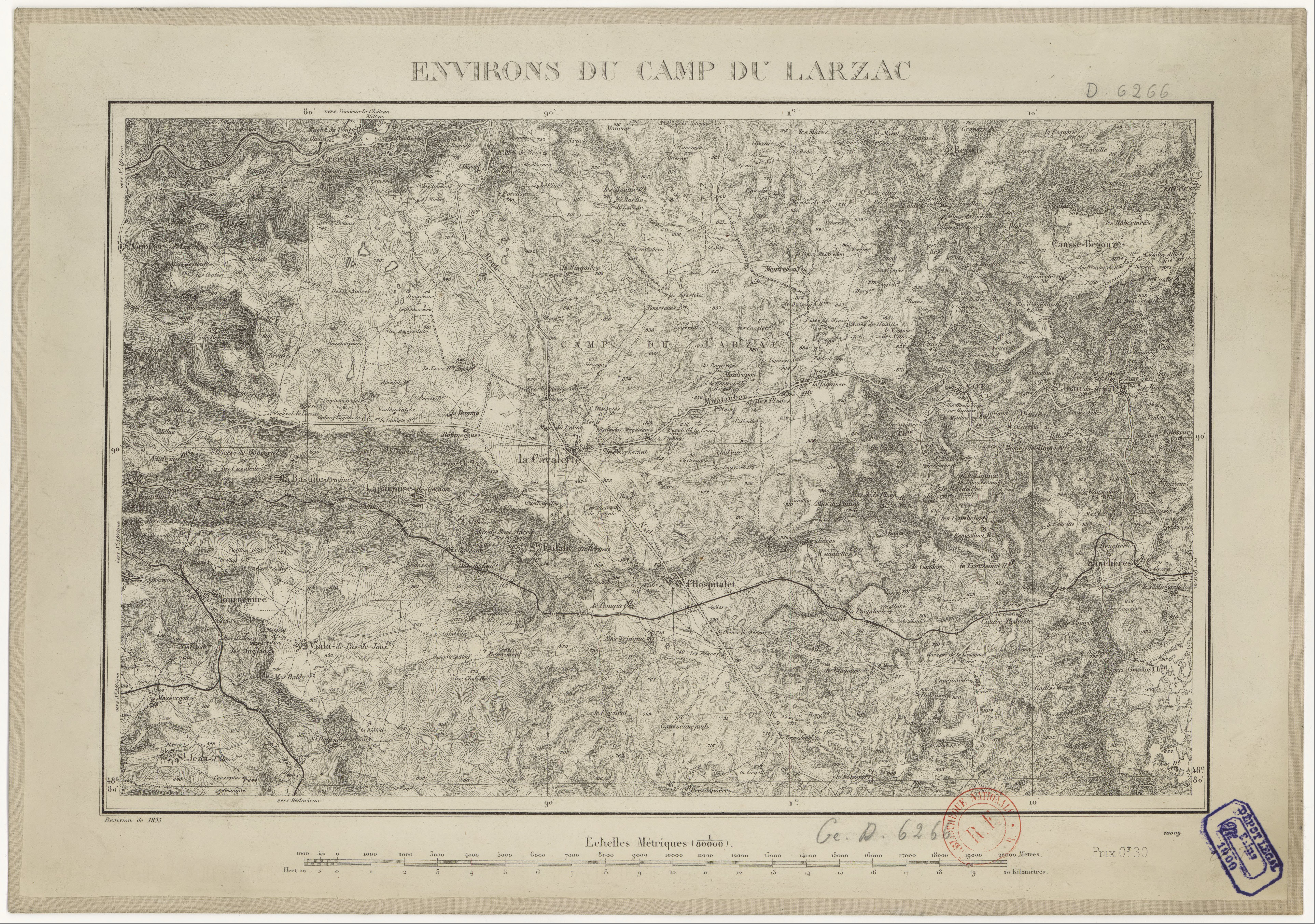 « Environs du camp du Larzac », carte au 1/80 000, dressée et éditée par le Service géographique de l'armée française, révision de 1893